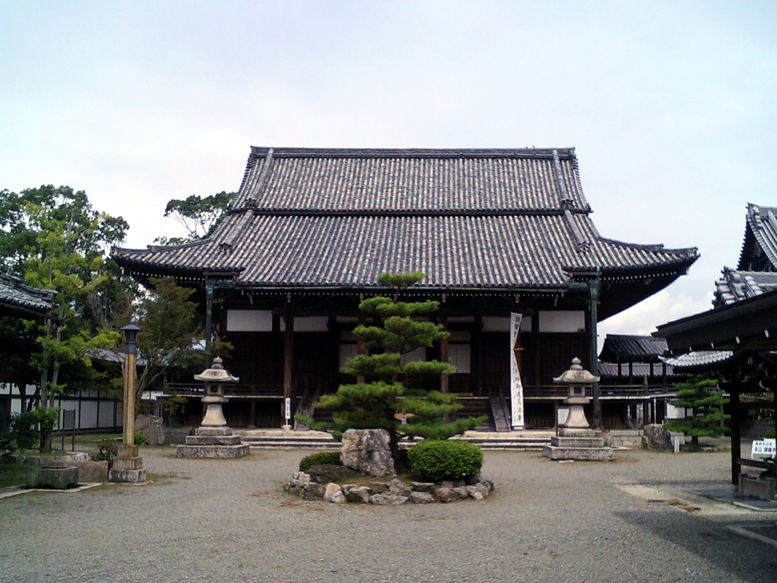 Kinshokuji temple in Kibe, Yasu, Shiga, Japan.